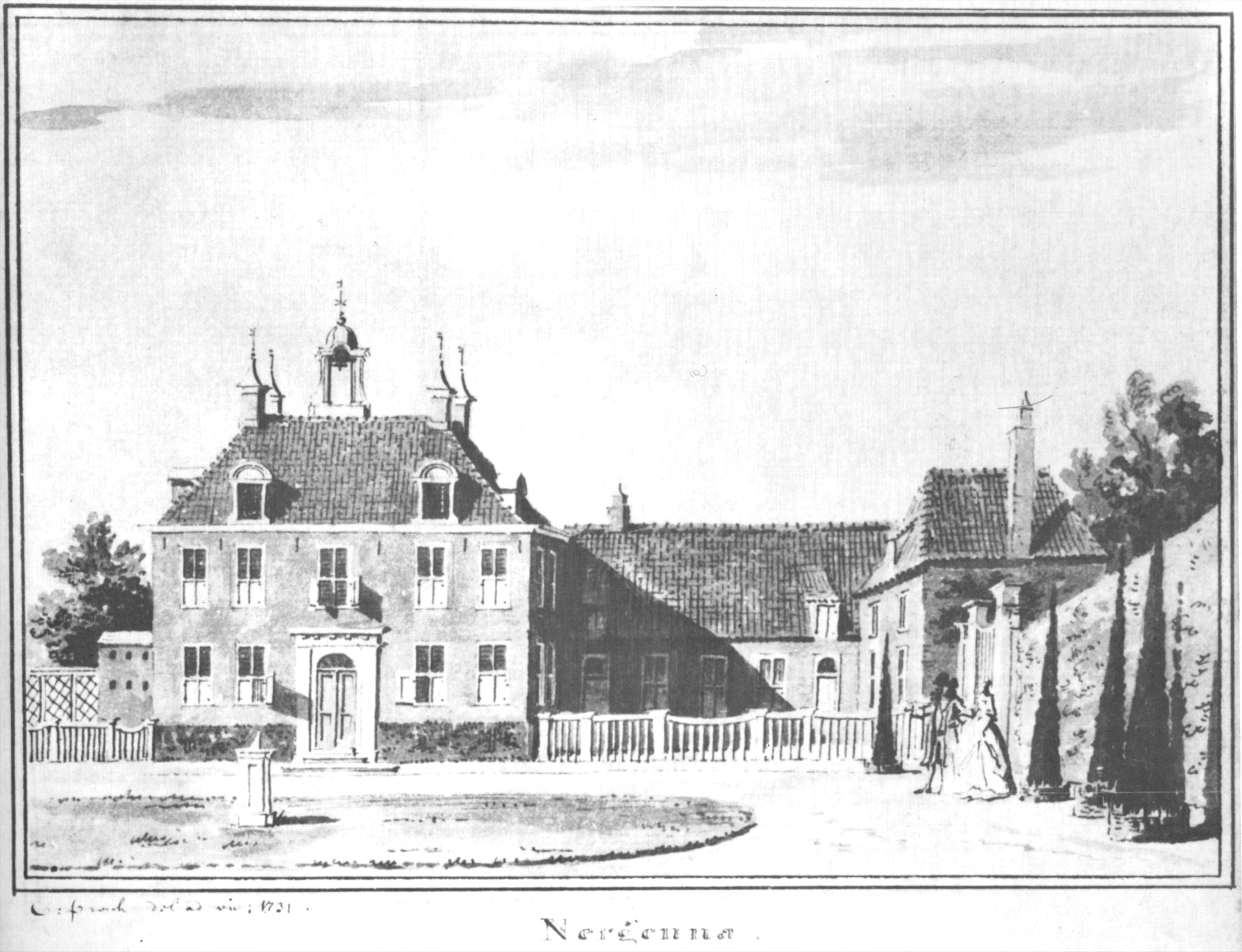 Heerenhuis Nergena te Bennekom, Nederland.